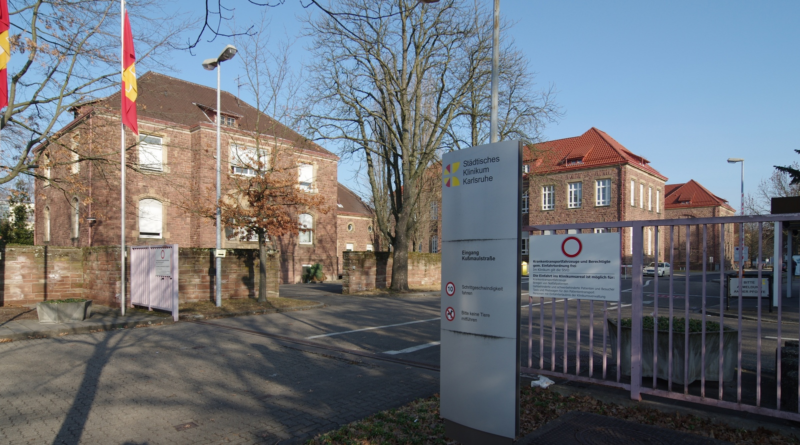 Städtisches Klinikum Karlsruhe, Einfahrt Kußmaulstraße.